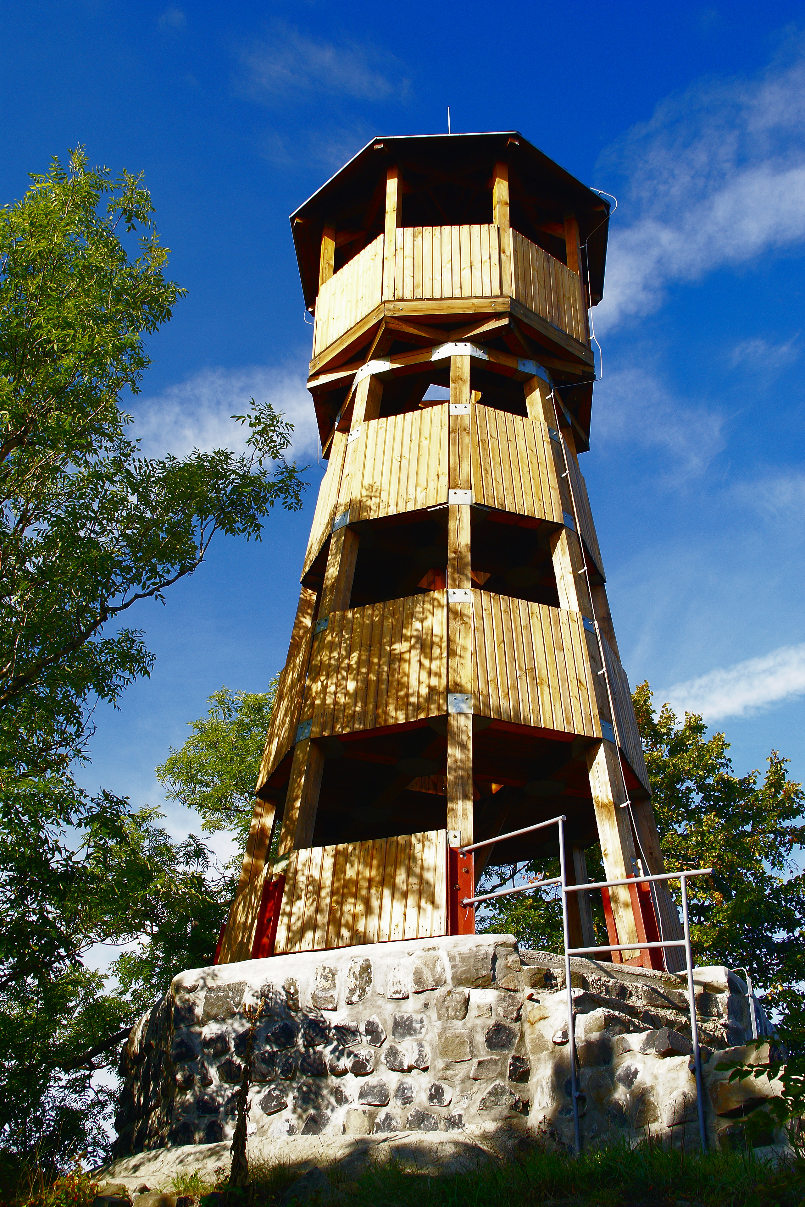 České středohoří, dřevěná rozhledna na Strážném vrchu u Merboltic na Děčínsku.